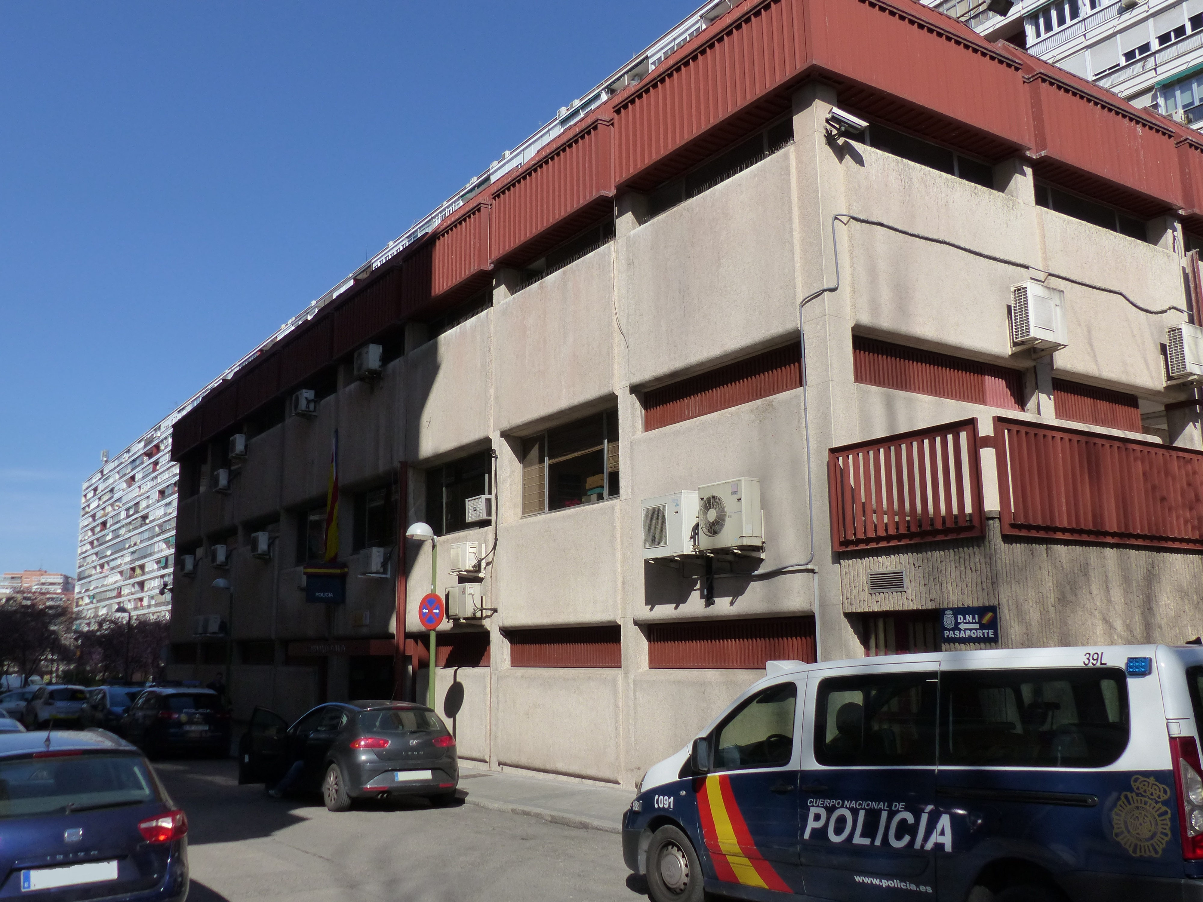 Barrio de la Concepción